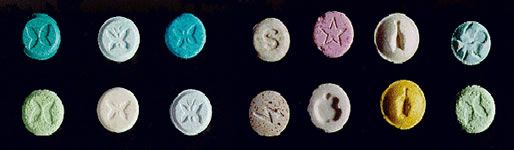 Ecstasy tablets